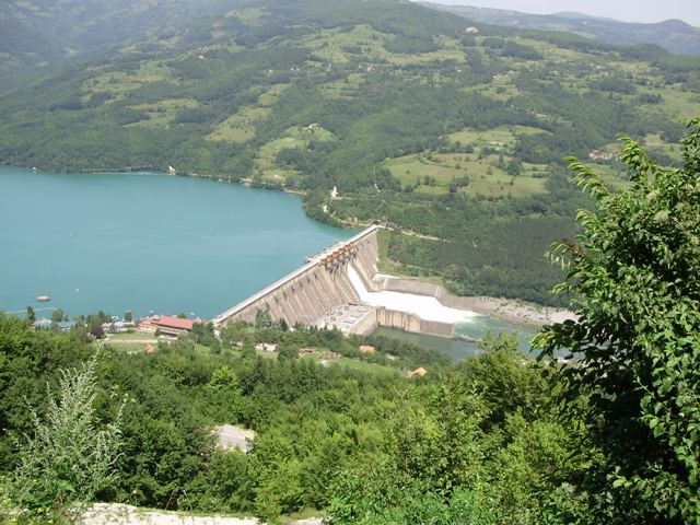 Perucac